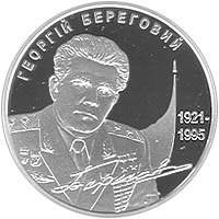 Монета Украины "Георгий Береговой". Реверс